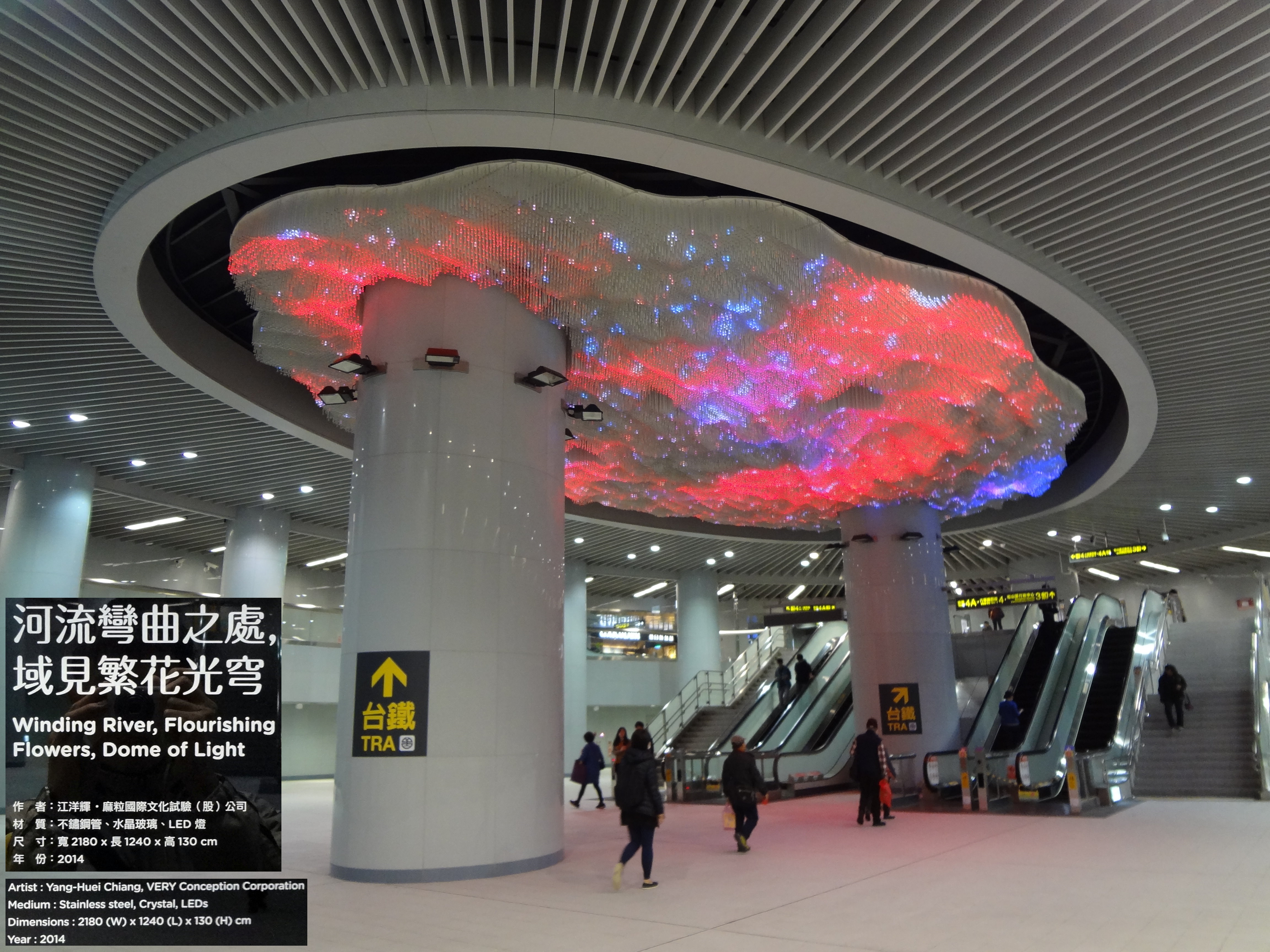 臺北捷運松山站公共藝術：2014年江祥輝作品《河流彎曲之處，域見繁花光穹》。